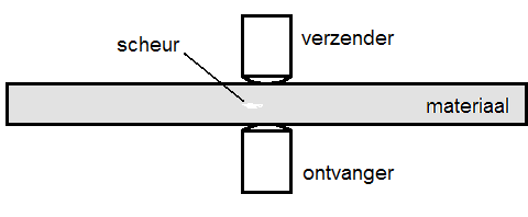 opstelling ultrasoon onderzoek zelf, autoCAD+paint MADe 16 jun 2005 18:40 (CEST)